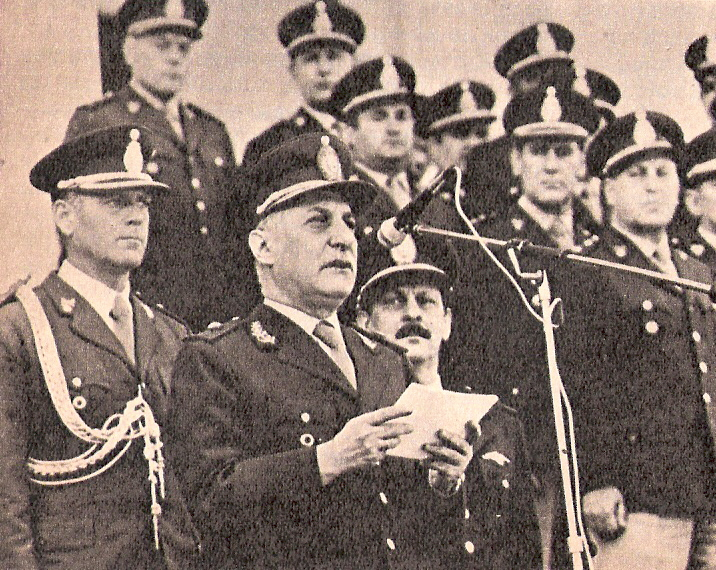 Roberto Viola, argentinischer Militärmachthaber